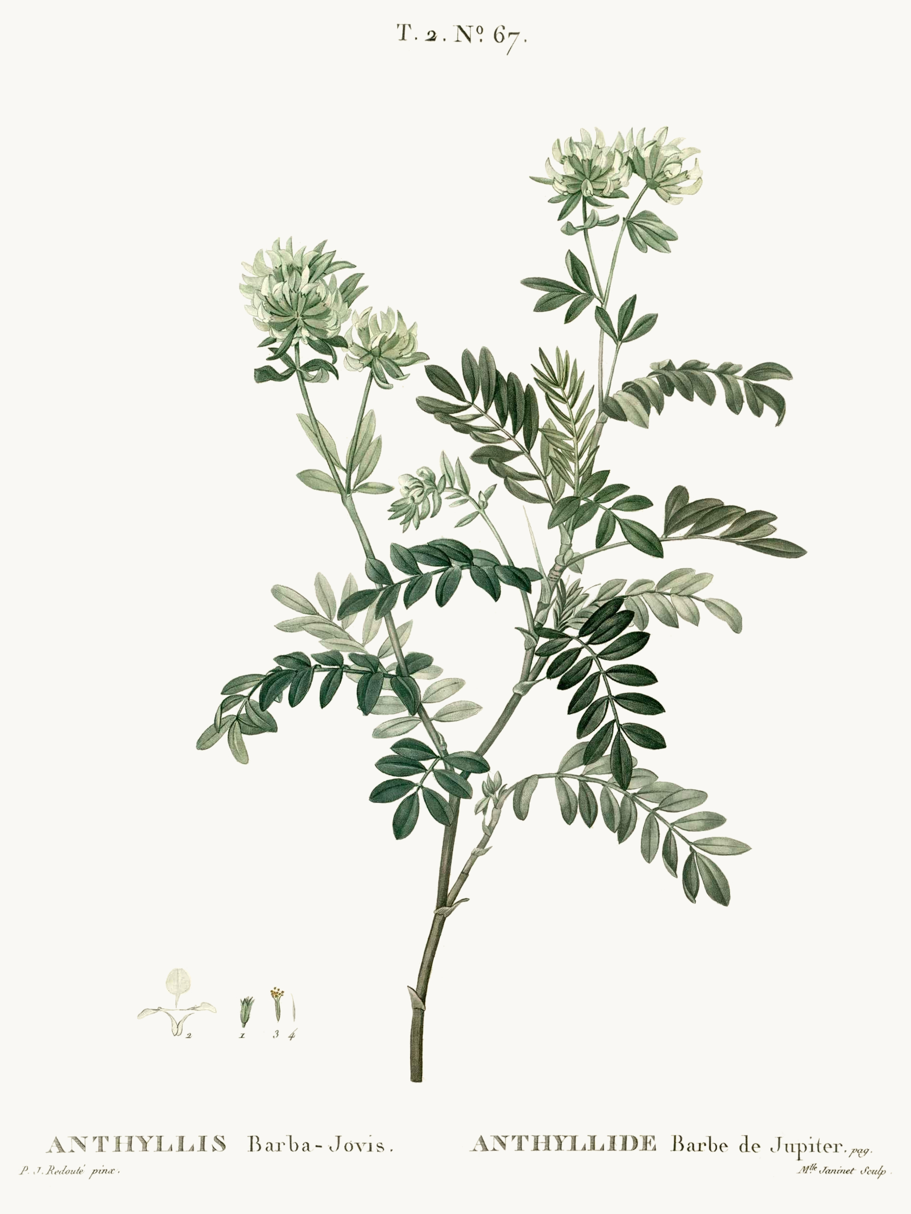 Anthyllide Barbe de Jupiter, Barbe de Jupiter